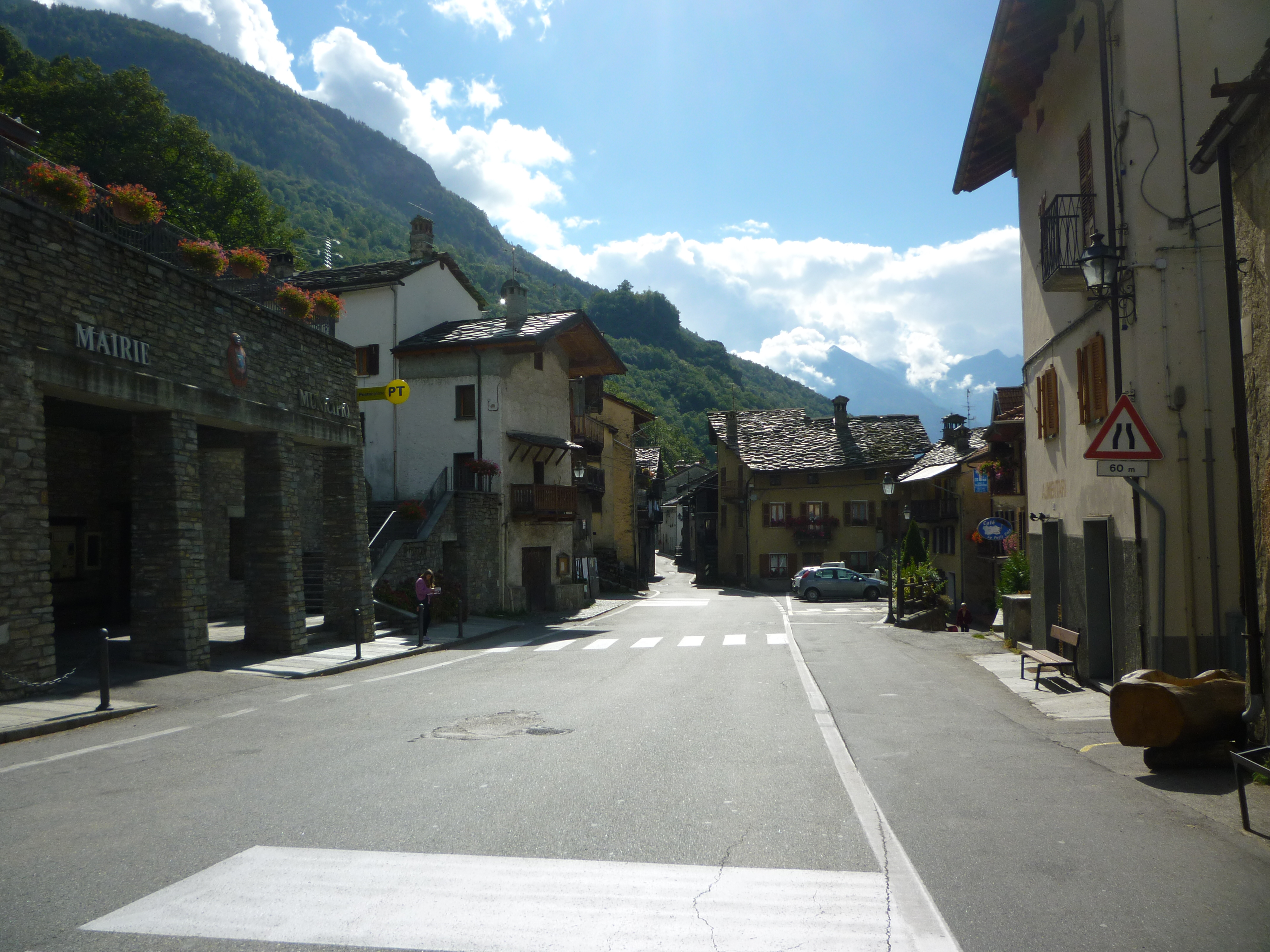 Bourg de Lillianes (Vallée d'Aoste - Italie)